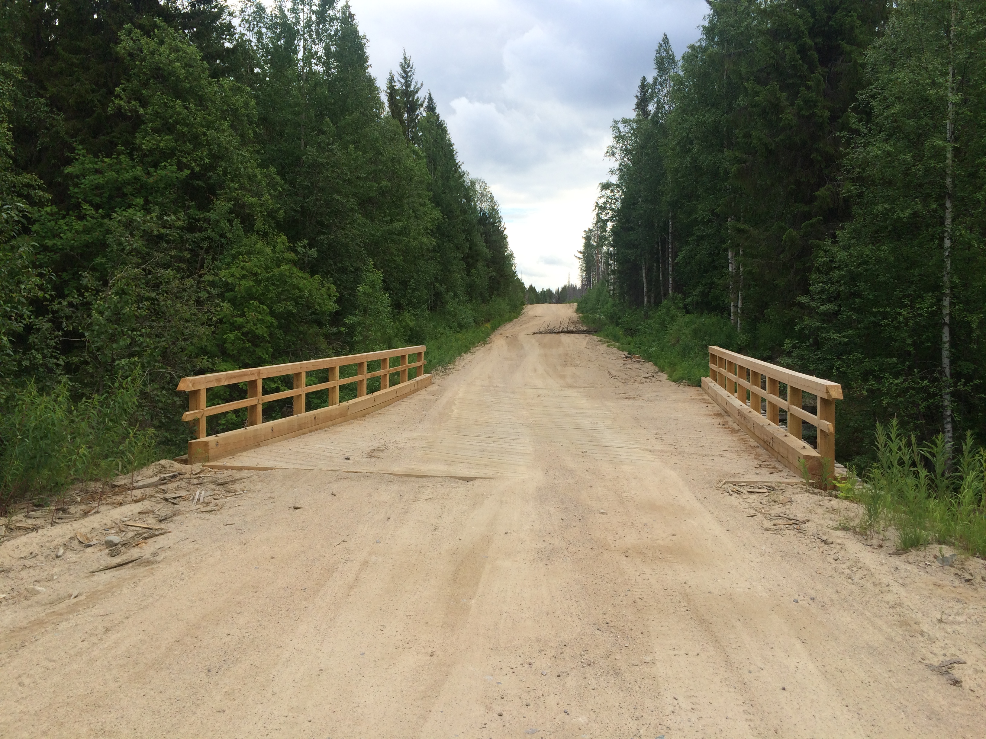 Шигеренджа